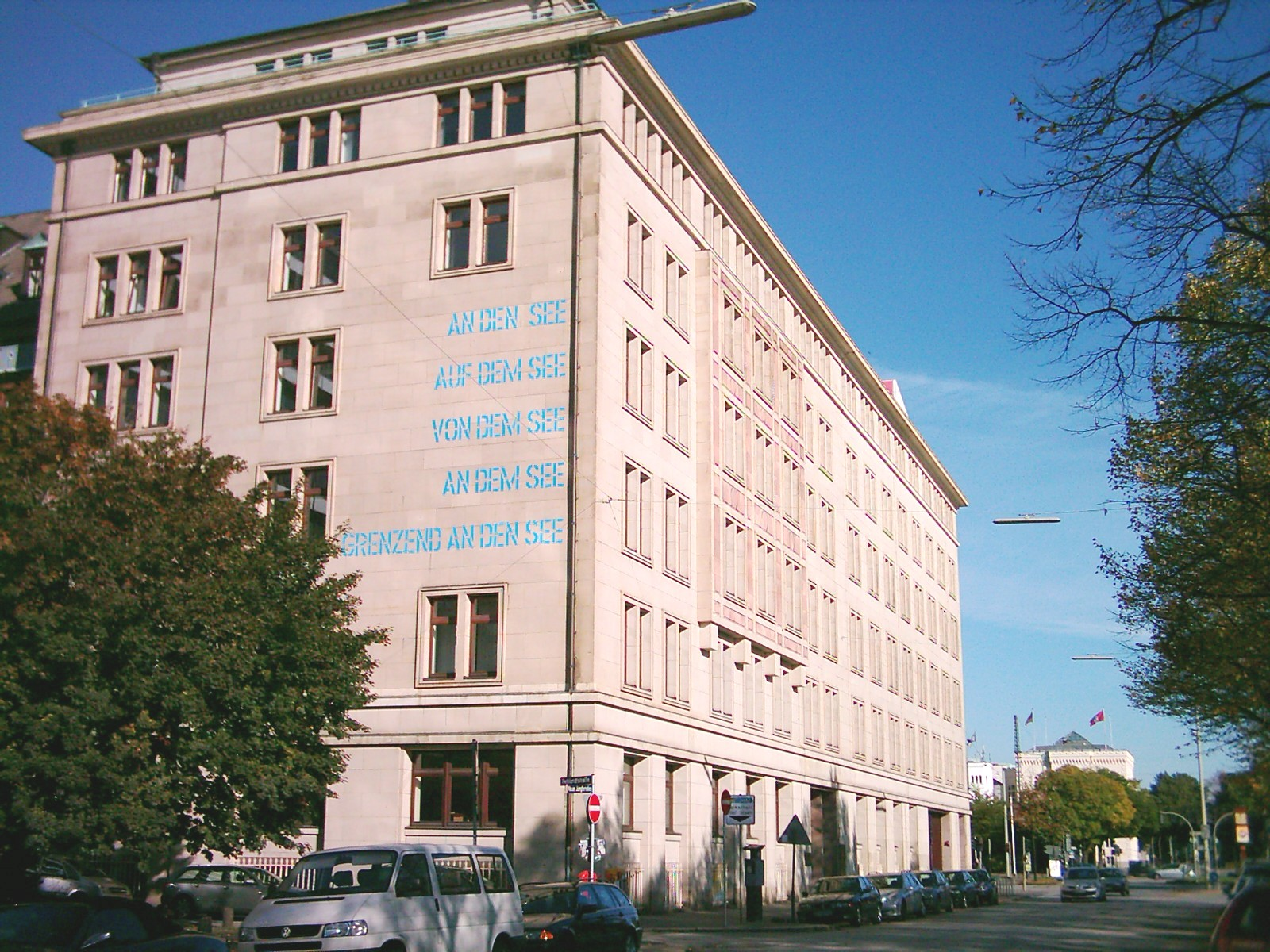 Hamburg, Neuer Jungfernstieg 21. Sitz der Deutschen Zentralbibliothek für Wirtschaftswissenschaften (ZBW), des GIGA German Institute of Global and Area Studies, sowie des Afrika-Vereins. Siehe auch / See also Image:Hamburg Deutsche Zentralbibliothek für Wirtschaftswissenschaften 02.jpg Image:Hamburg, Neuer Jungfernstieg 21 03.jpg Image:Hamburg, Neuer Jungfernstieg 21 04.jpg